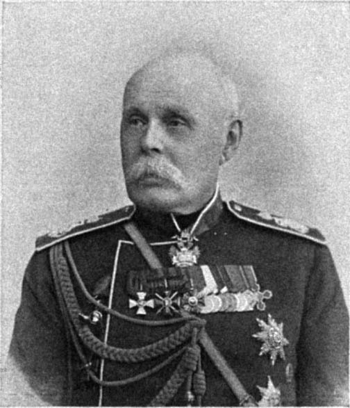 Туркестанский генерал-губернатор Н. О. Розенбах